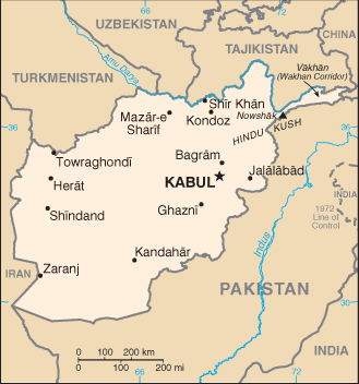 карта на Афганистан